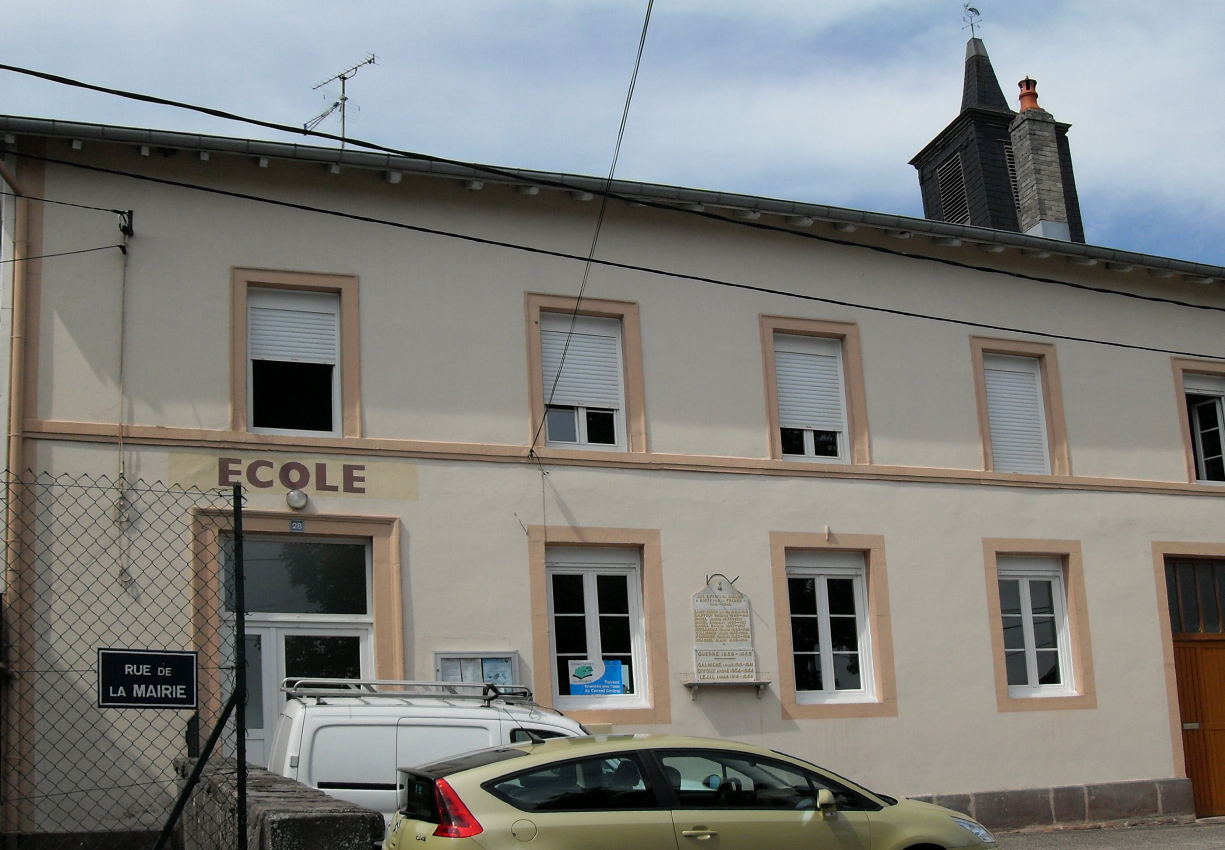 La mairie-école de Roulier